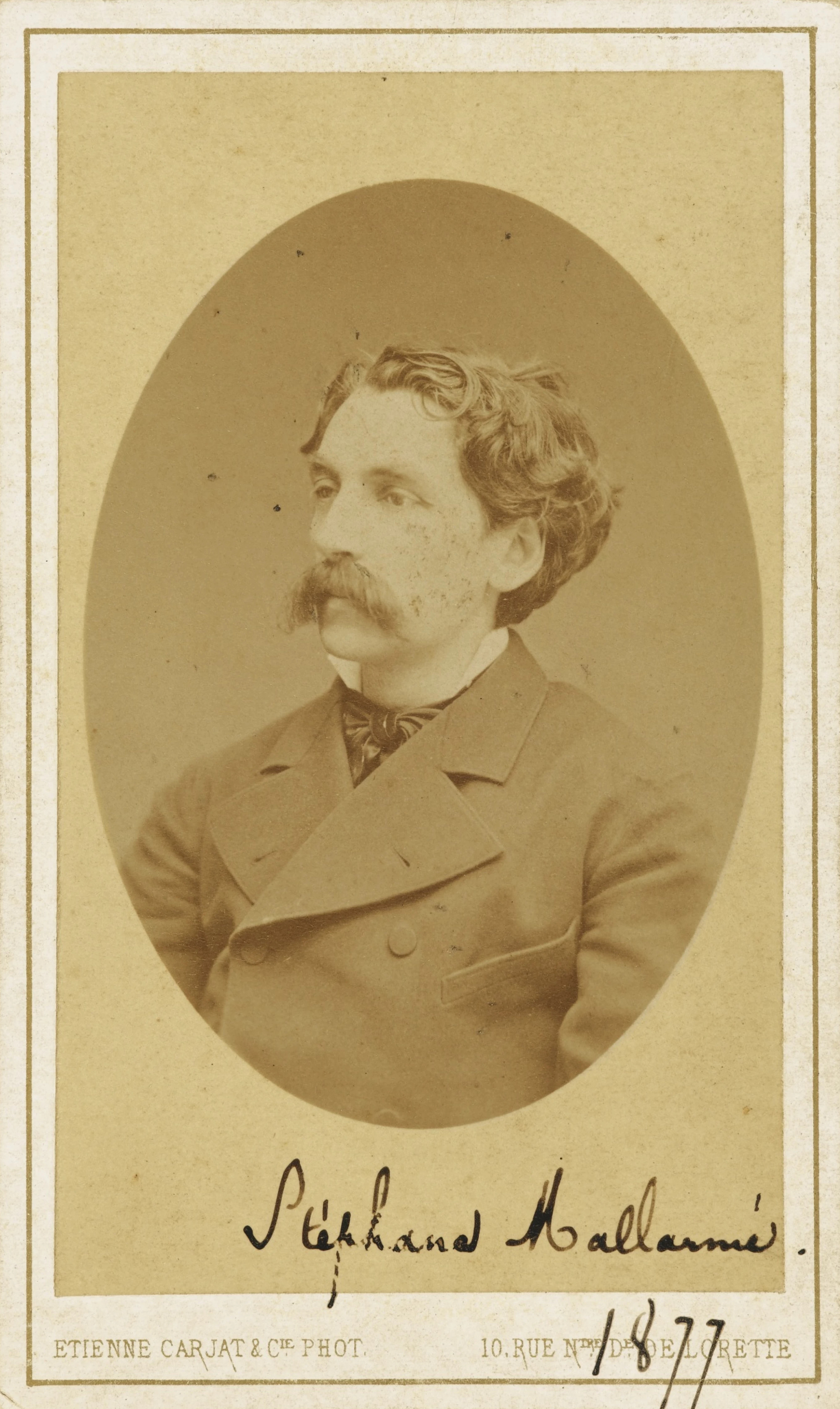 Photo de Stéphane Mallarmé